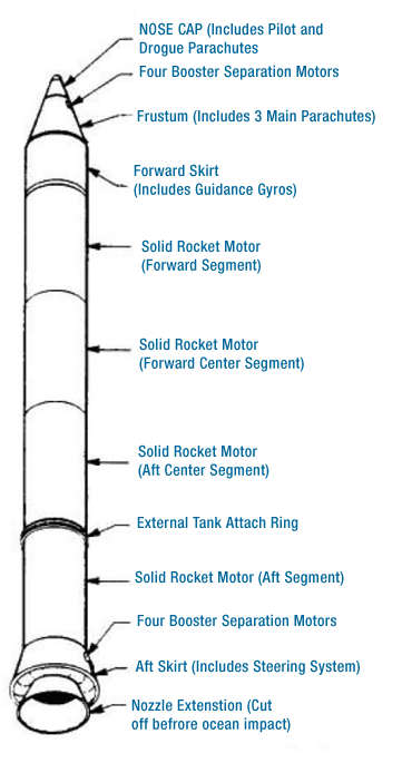 Shéma des Boosters de la Navette